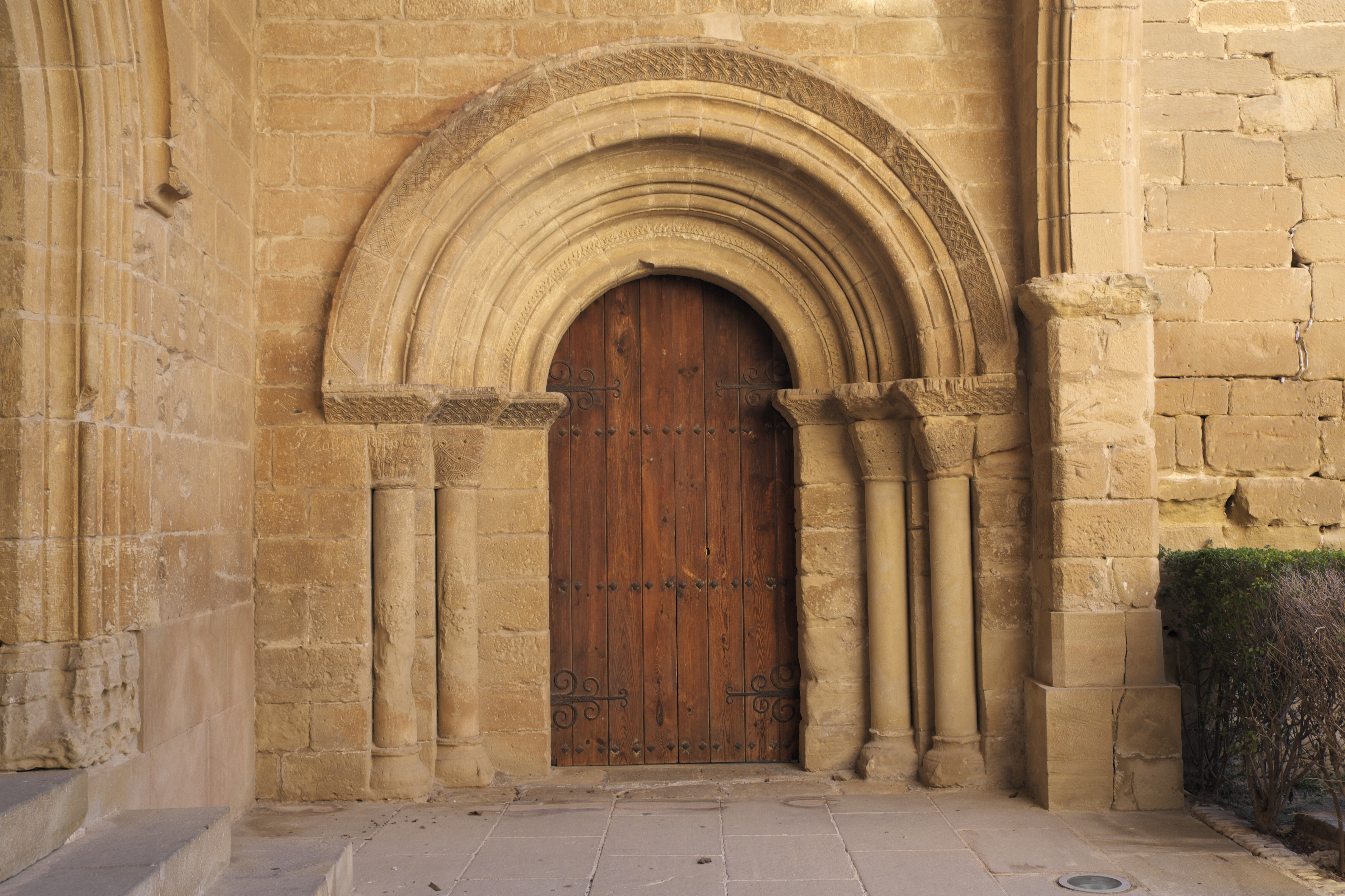 Castillo-Convento von Alcañiz in der Provinz Teruel (Aragonien/Spanien), Portal zum Kreuzgang